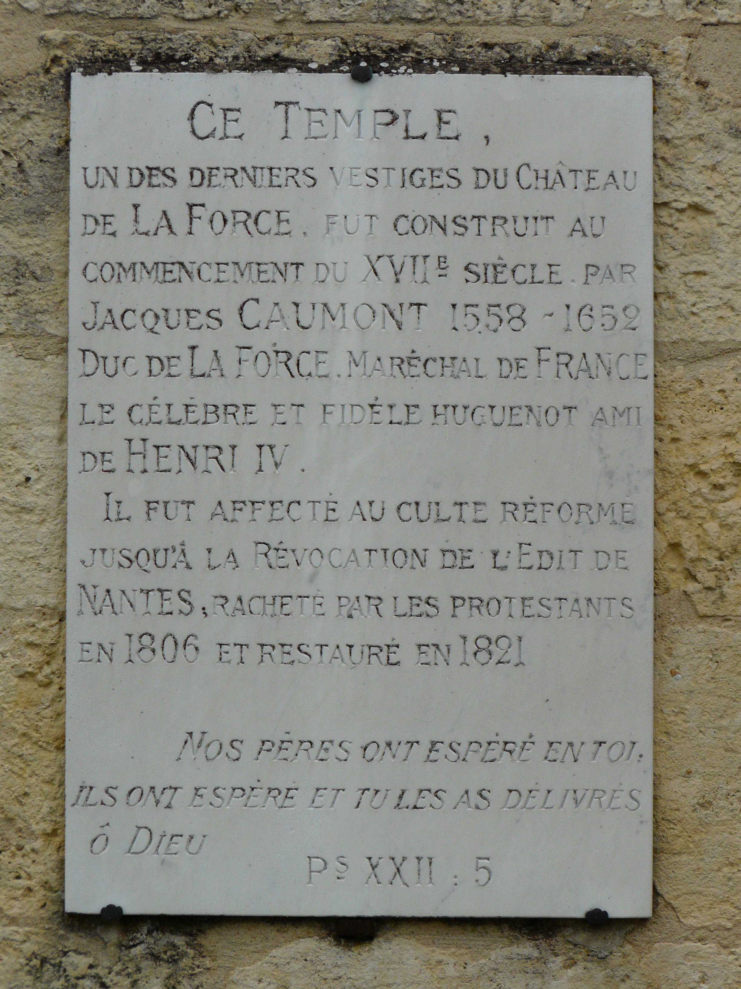 Plaque relatant l'historique du temple protestant de La Force, Dordogne, France.